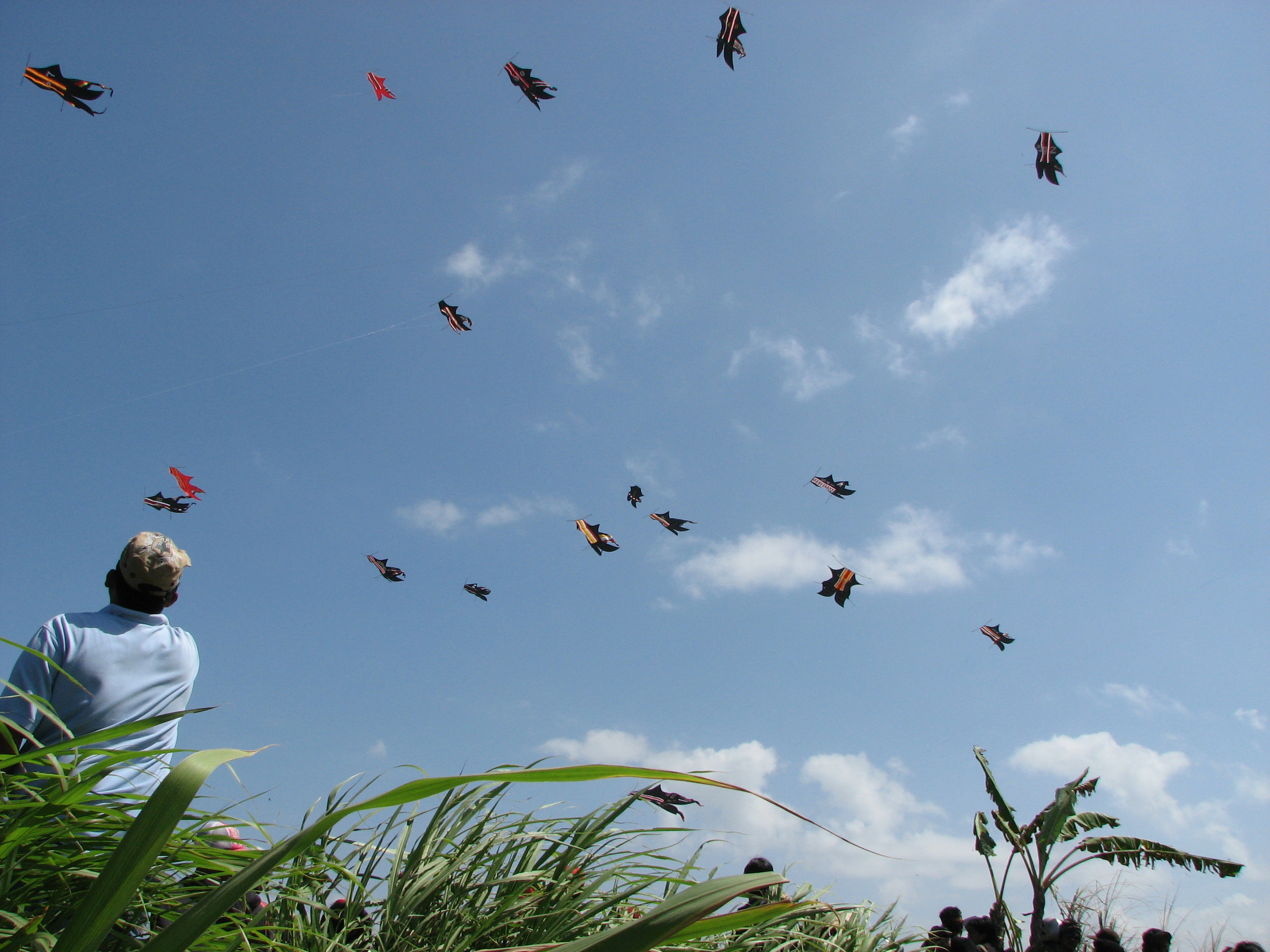 Bali Kite Festival (Padang Galak Beach)